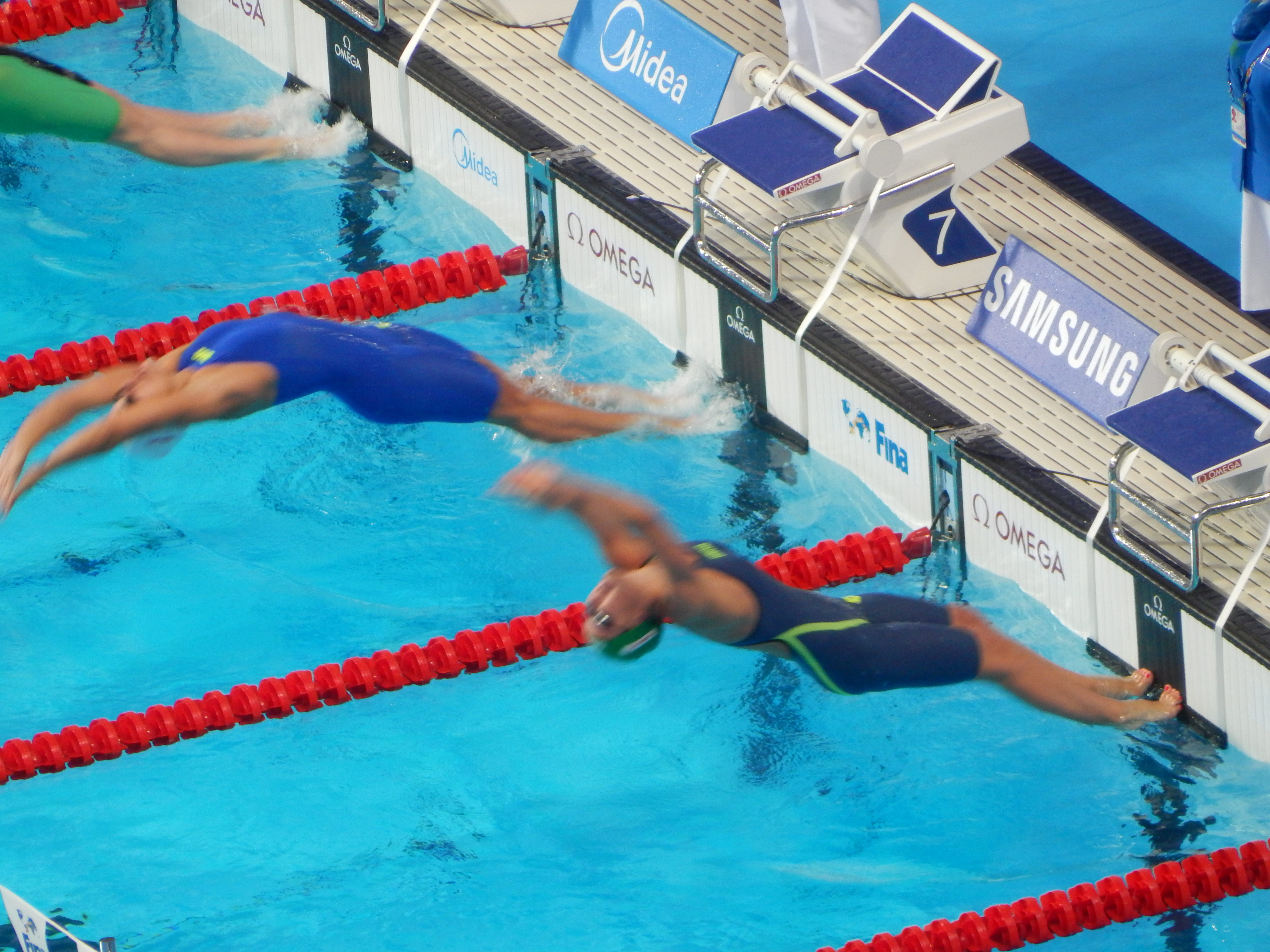 Старт первого полуфинала на дистанции 50 метров на спине у женщин в Казани на ЧМ